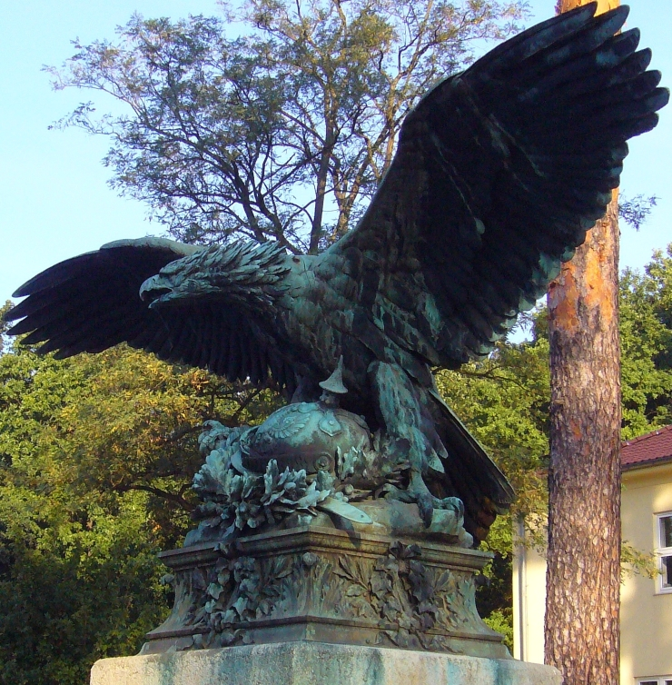 AdolfBreymann_Adler_RemeberanceOfGermanFrenchWar1871